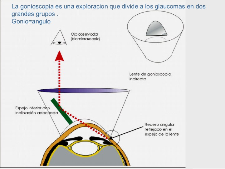 Gonioscope and gonioscopy